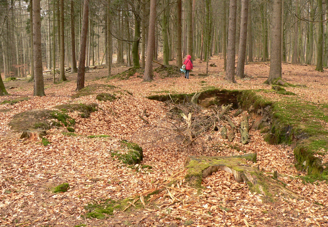 Schnippenburg, früherer Grabungsschnitt im Wall